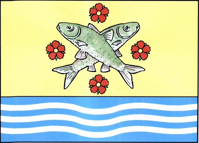 vlajka, Dobrá Voda, okres Žďár nad Sázavou